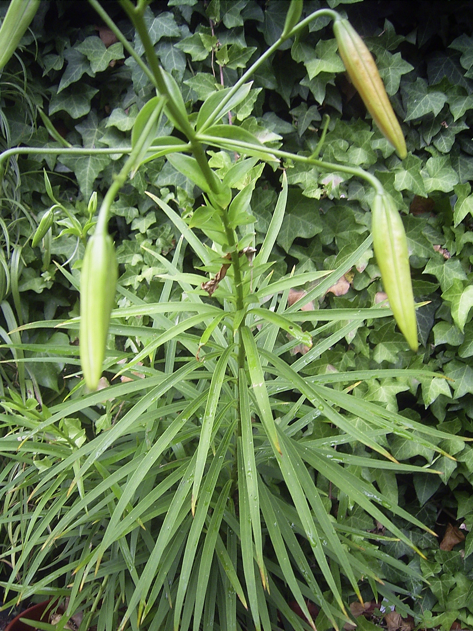 Lilium rosthornii habitus